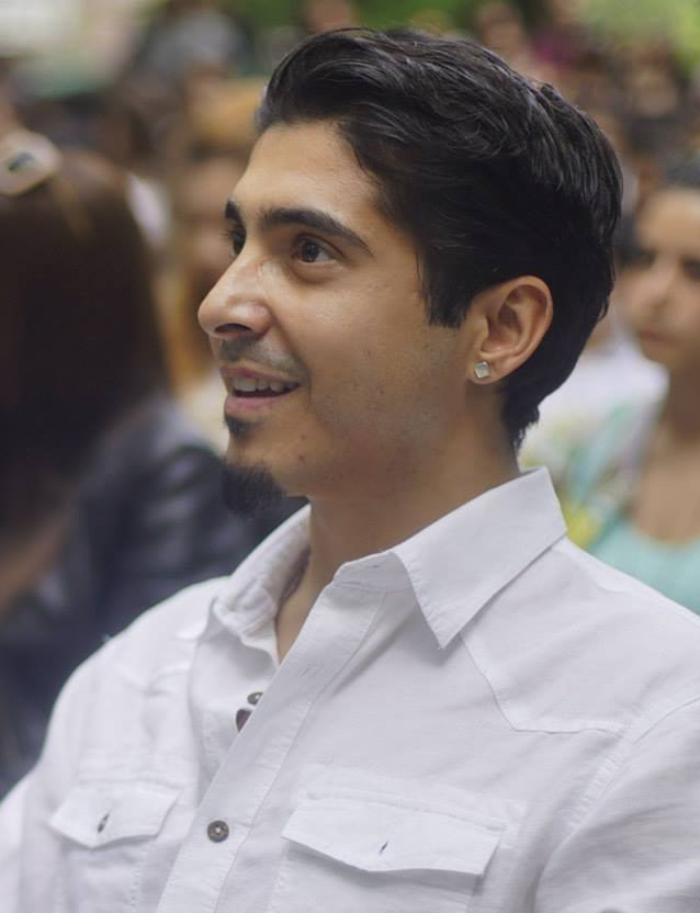 Ferman Akgül, 12. Radyo Boğaziçi Müzik Ödülleri'nde.